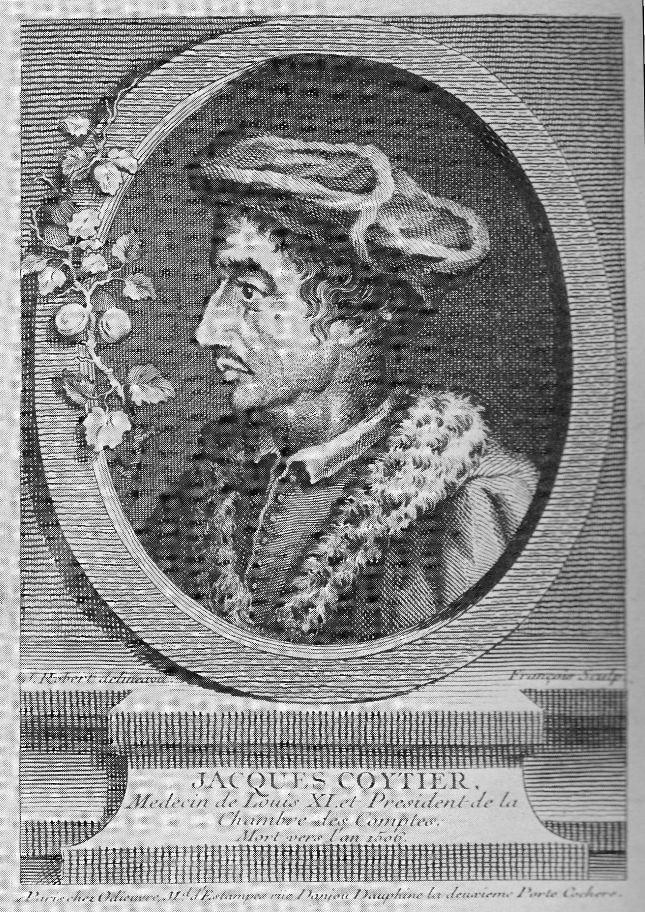 Jacques Coitier ou Coictier médecin personnel de Louis XI de France.